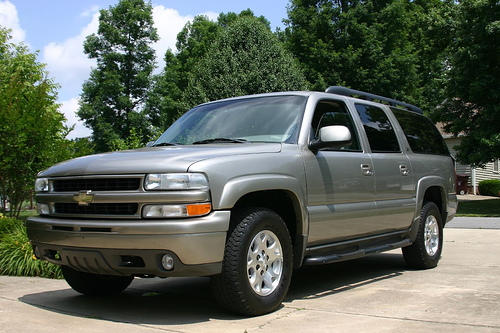 Chevrolet Suburban (GMT800)